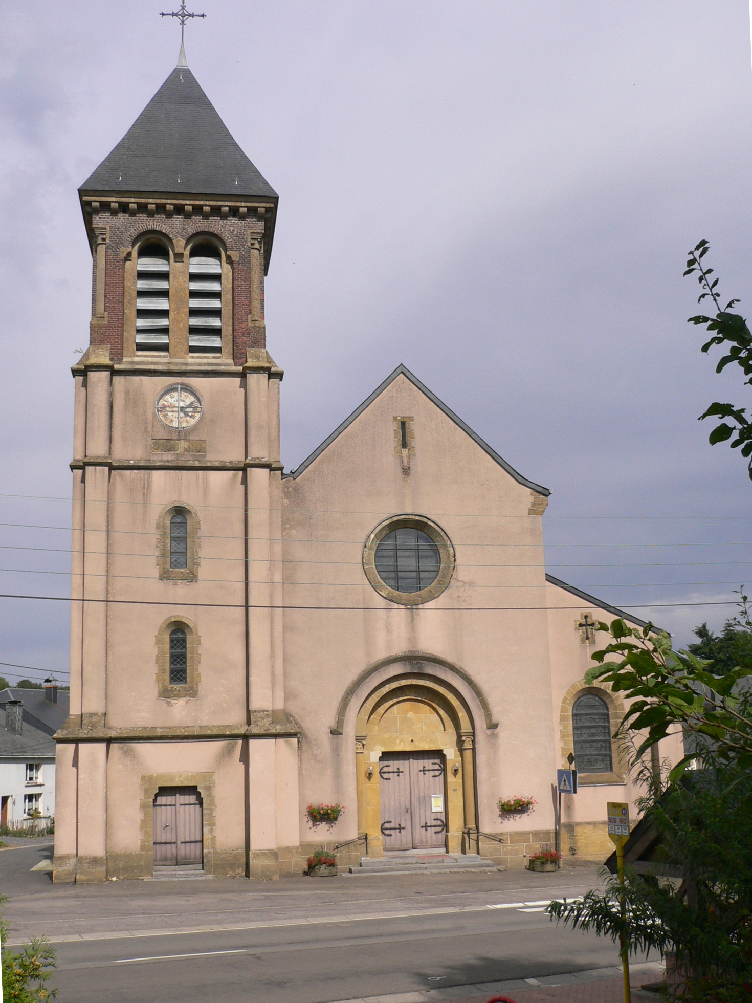 Eglise de Lacuisine, Florenville